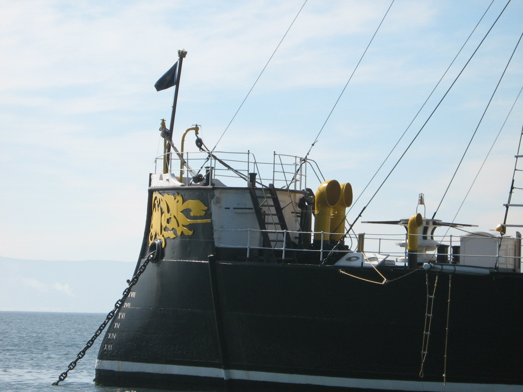 Proa del monitor Huáscar. Se puede apreciar el espolón y el cabrestante.